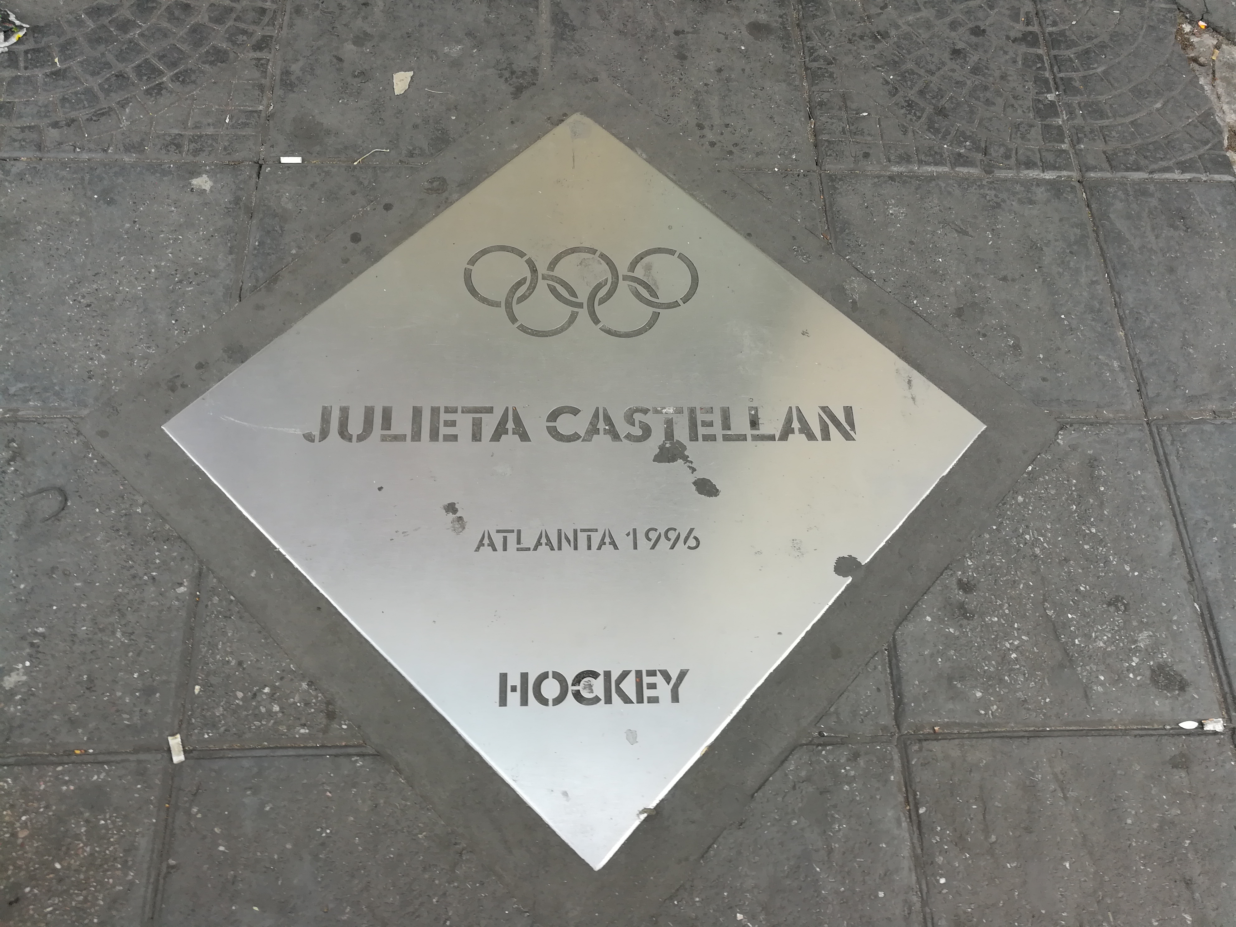 Paseo de los Olímpicos de los en la Avenida Pellegrini (Rosario).